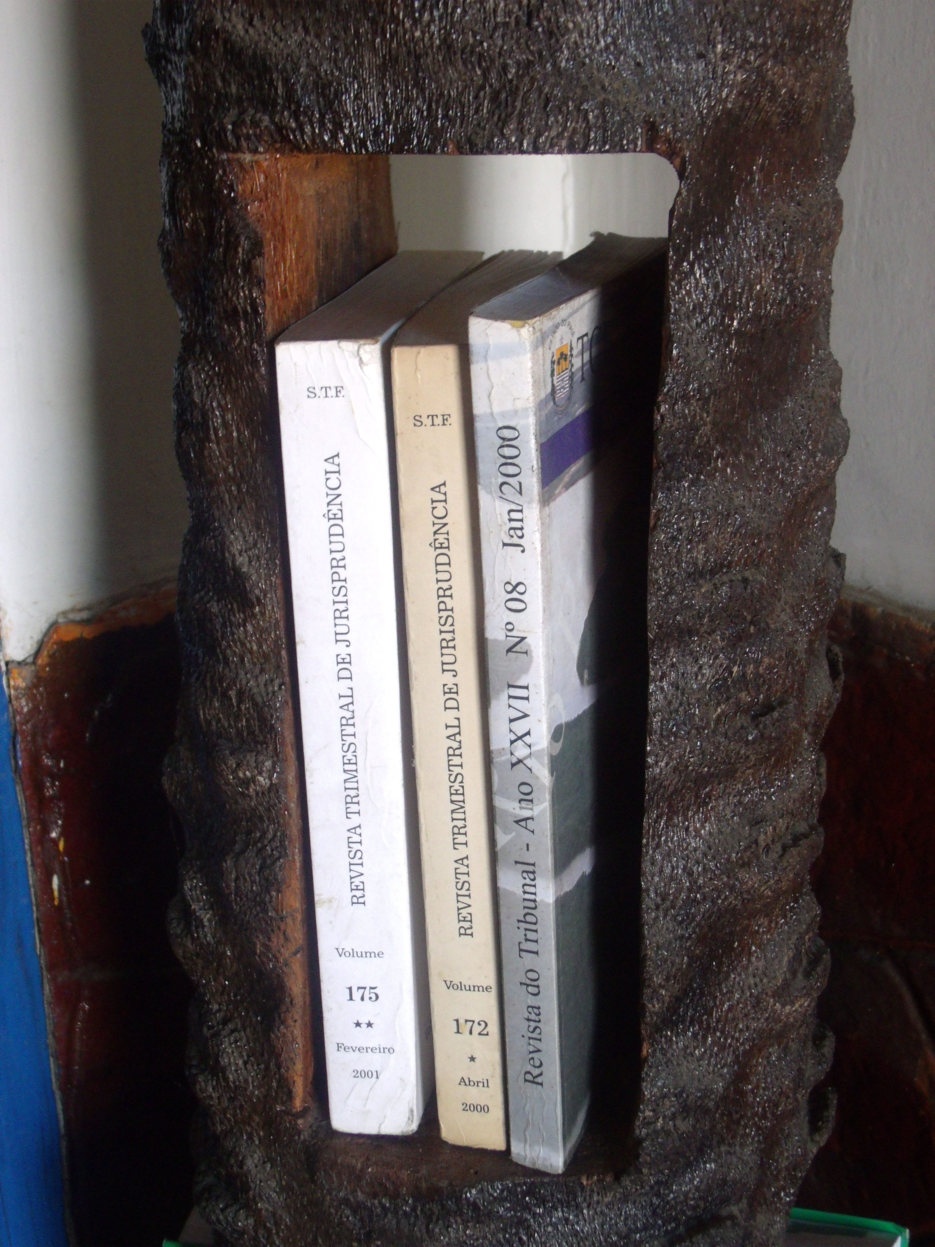 Biblioteca de carnaúba com as Revista do STF e do Tribunal de Contas do Piauí.